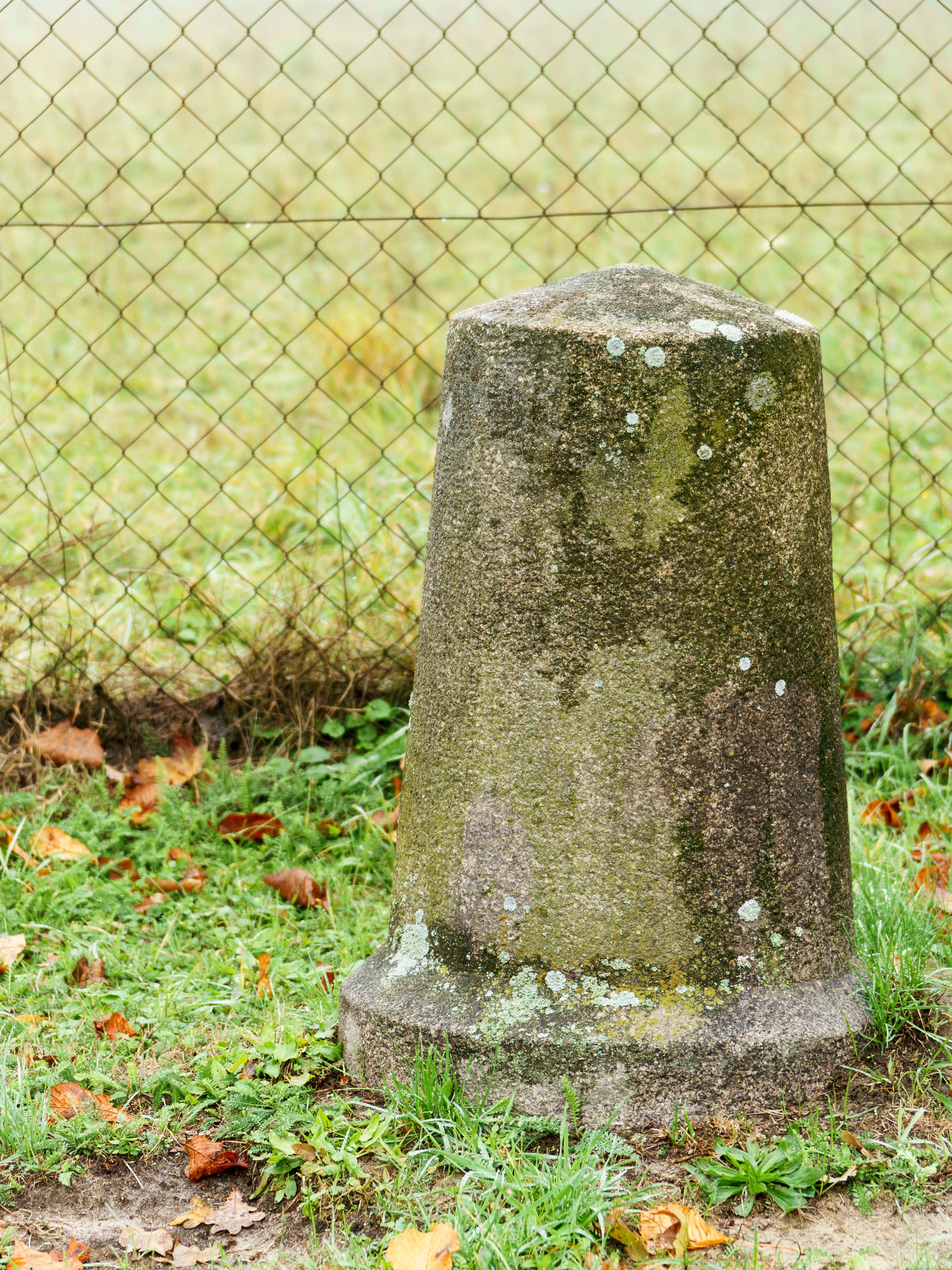 Preußischer Rundsockelstein (0851) an der L 12 in Drüsedau